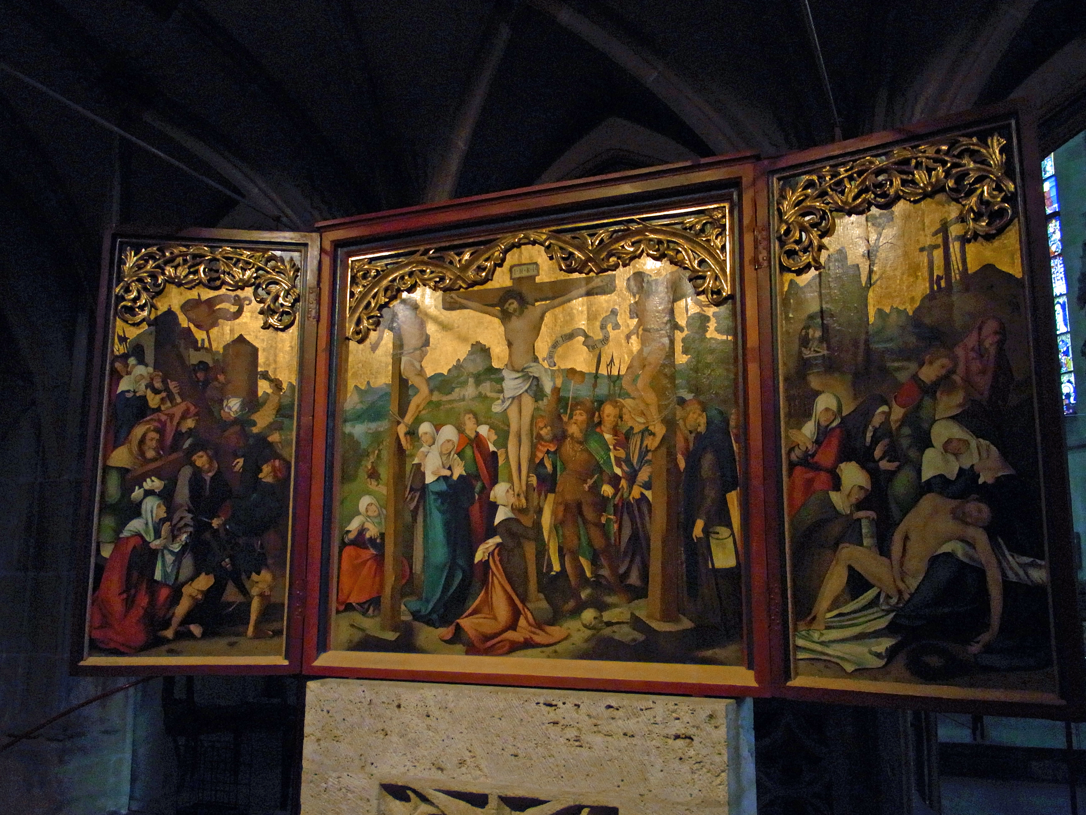 Stiftskirche St. Georg, Tübingen Flügelaltar Hans Schäufelin